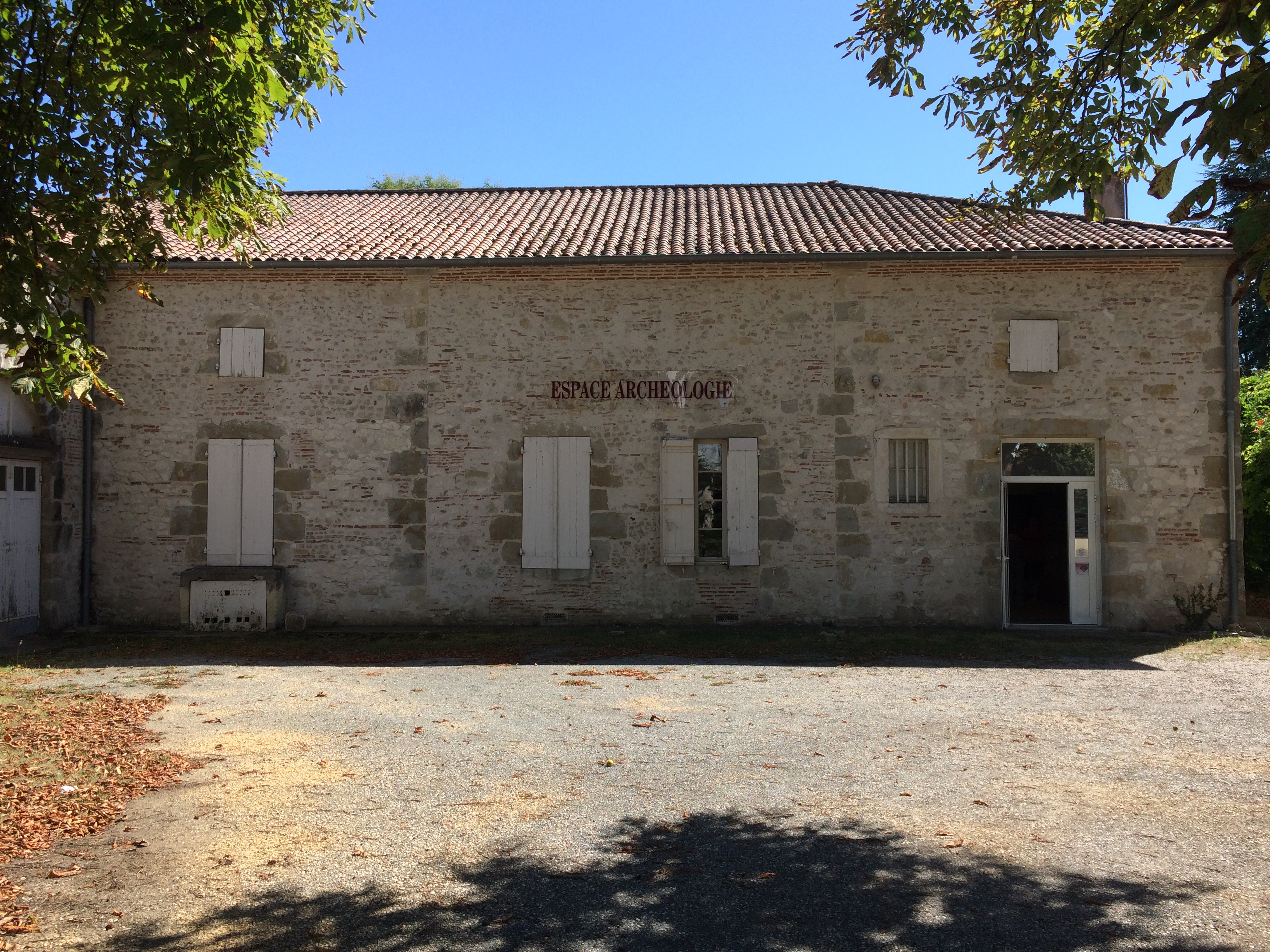 Musée du site antique d'Eysses (Lot-et-Garonne) le 8 août 2017.